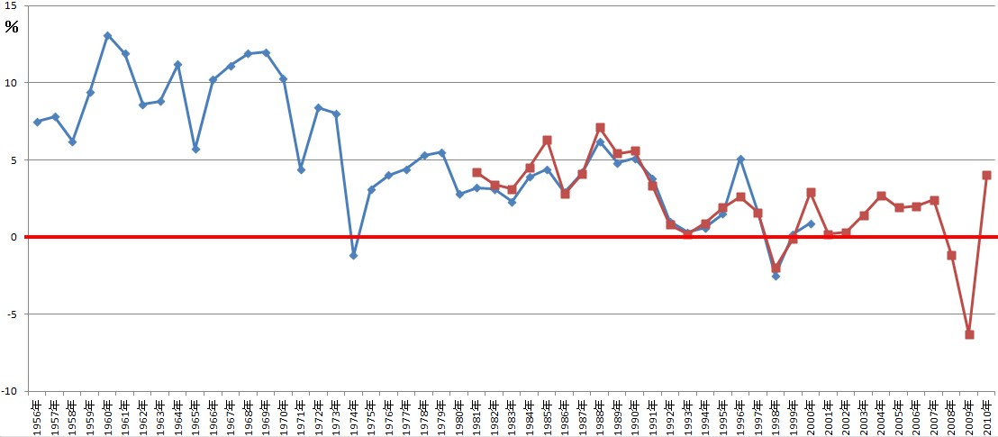 このグラフは、日本の実質GDP増加率の推移を表したものである。青い線が1990年基準によるグラフで、赤い線が2000年基準によるグラフとなっている。